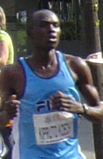 Nicolas Kiprutto Koech